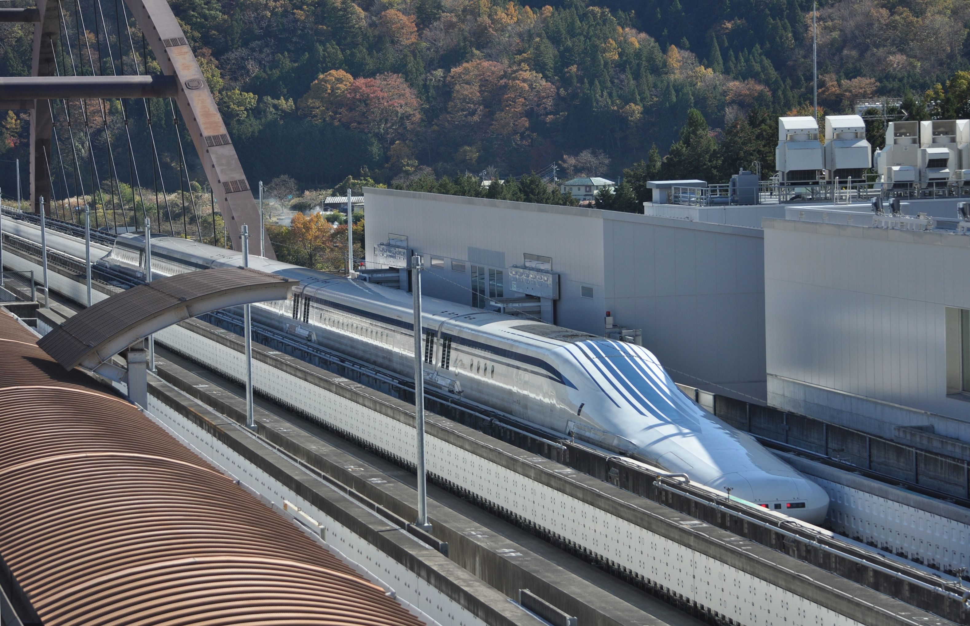 山梨県立リニア見学センター Nikon D5000